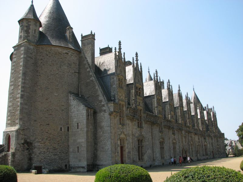 Das Schloss Josselin, Ostfassade